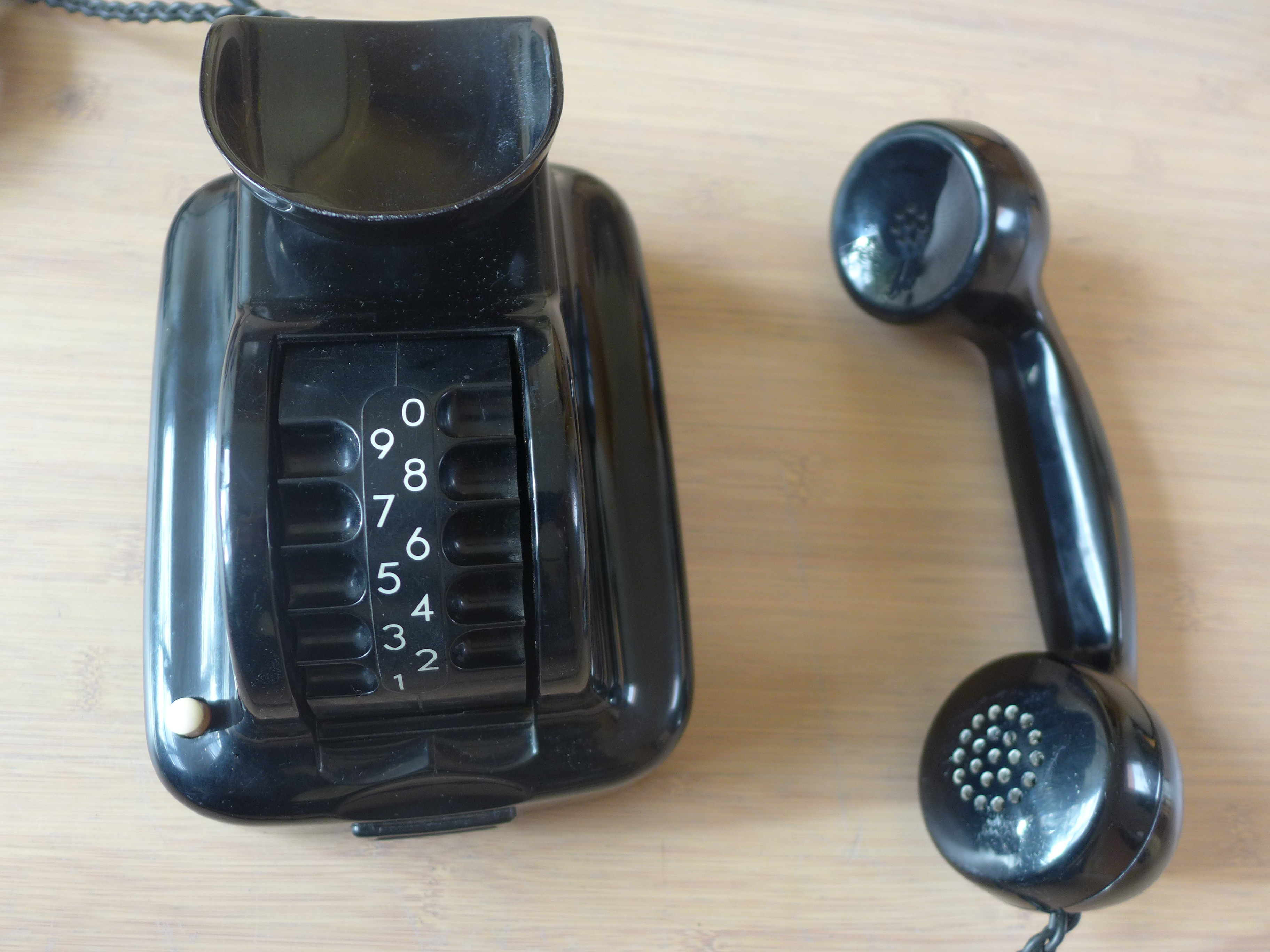 Hierbei handelt es sich um einen Trommelwähler der Firma Siemens und Halske